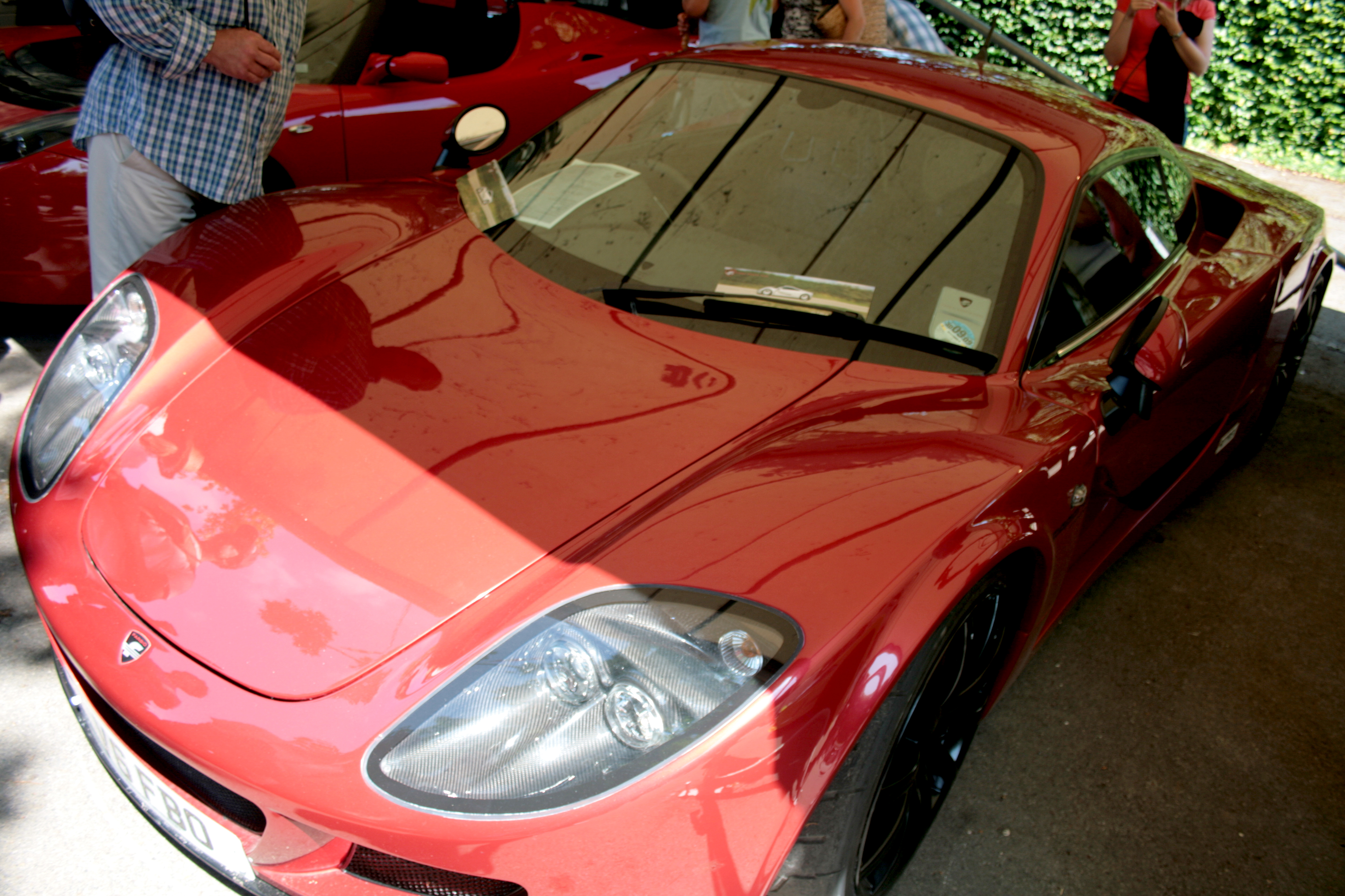 Farbio GTS350 at goodwood 2009